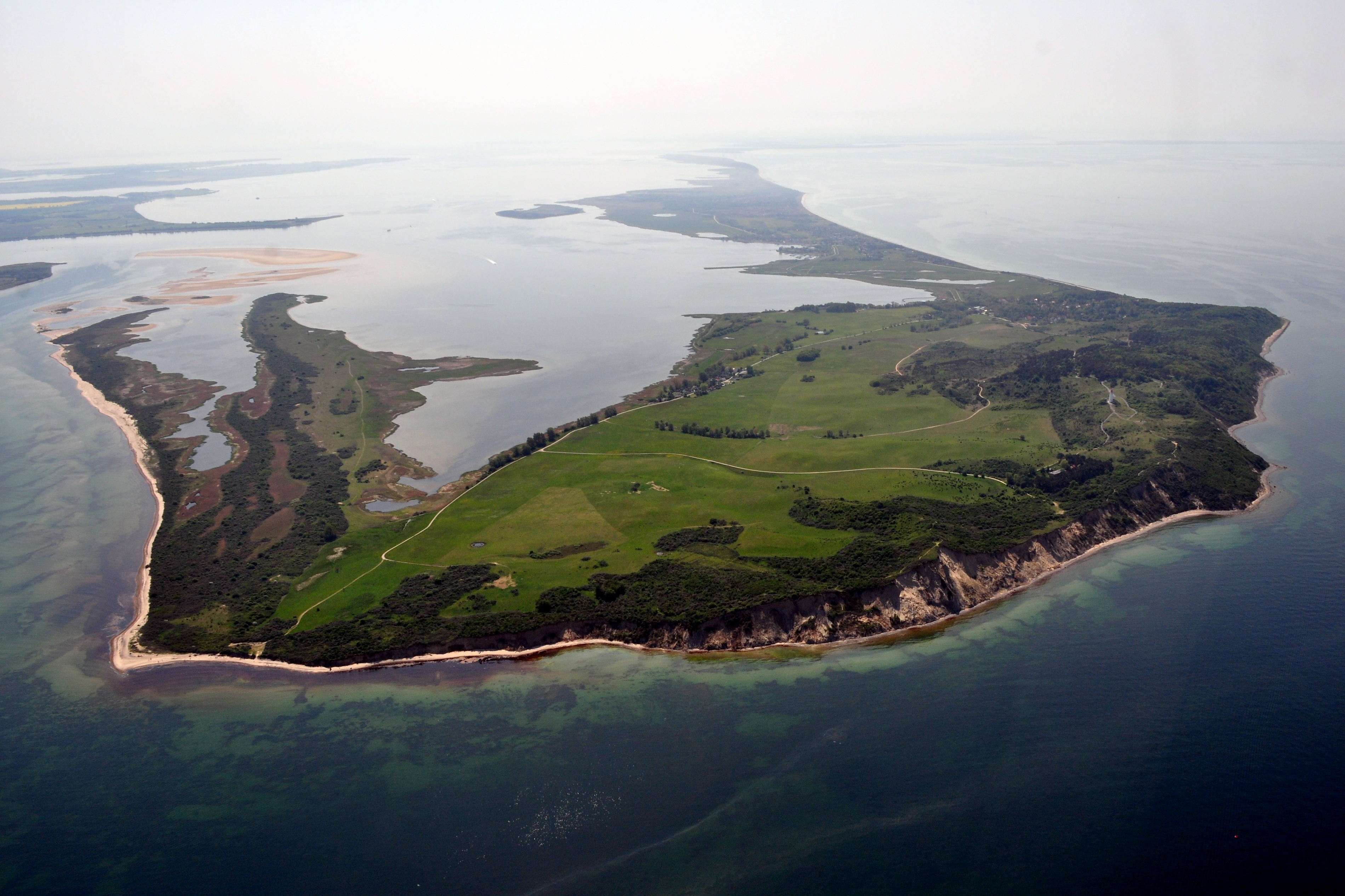 Die Bilder wurden von mir während eines einstündigen Rundflugs ab Flugplatz Güttin am 21. Mai 2011 aufgenommen. Die Bildbeschreibung steht im Dateinamen. Aufgenommen mit einer Nikon D5000 durch das Seitenfenster des Flugzeugs.